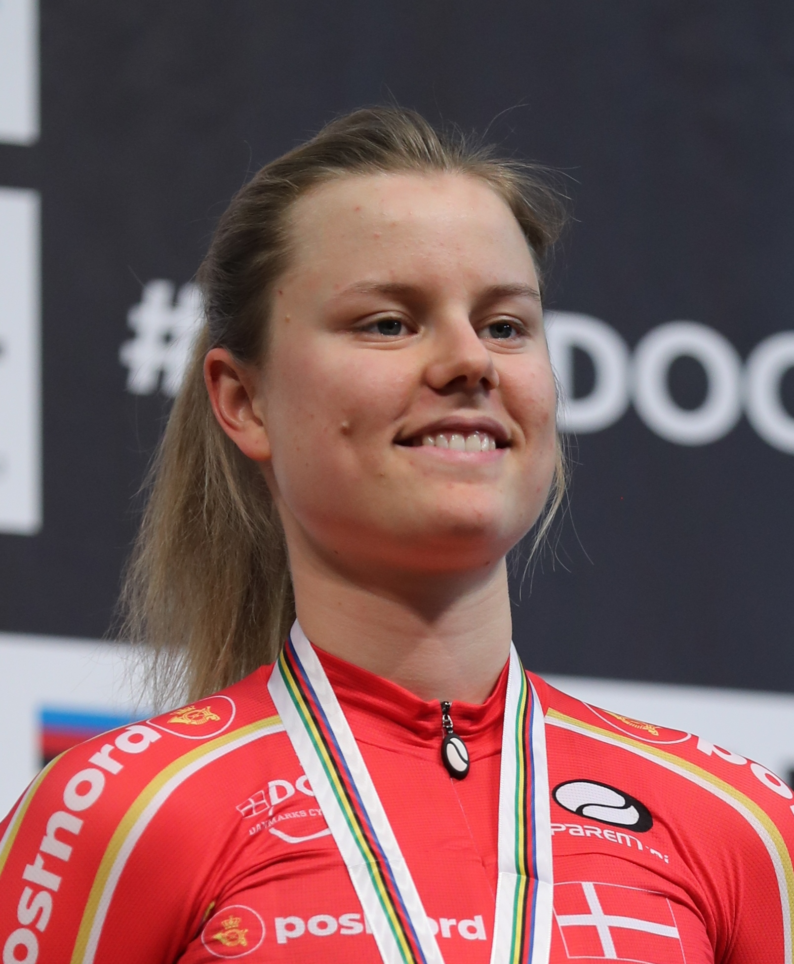 Amalie Dideriksen, dänische Radsportlerin - Bronze im Scratch